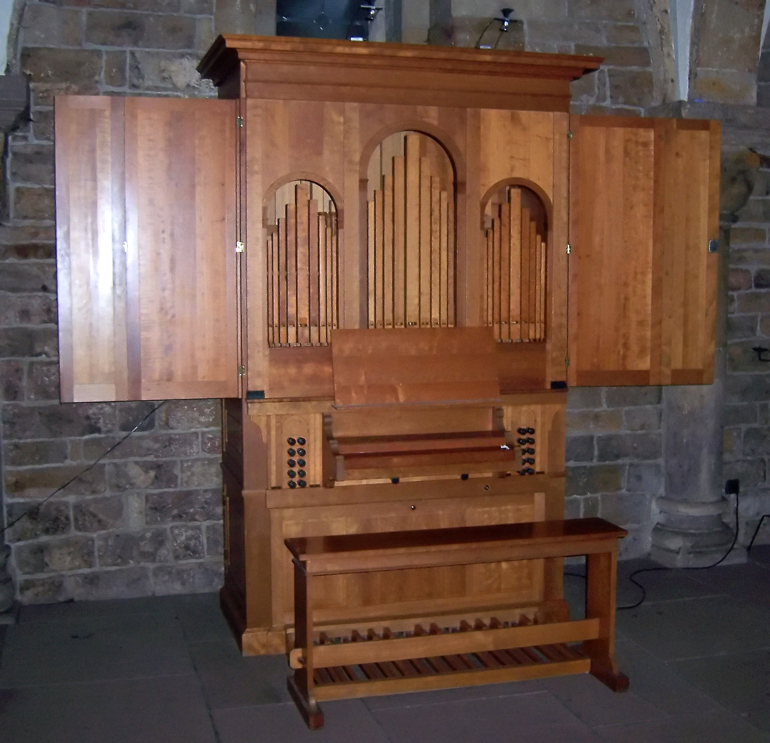 Bremer Dom: Klop-Orgel. Die 1991 in der niederländischen Orgelwerkstatt von Gerrit Klop gebaute zweimanualige Orgel ist eine Dauerleihgabe aus Privatbesitz, sie steht in der Ostkrypta unter dem Chor. St.-Petri-Dom